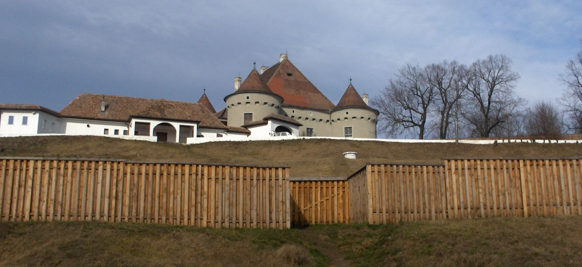 The palace from Cetatea de Baltă, Alba County, Romania